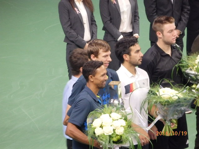 Premieutdeling Stockholm Open dobbel.